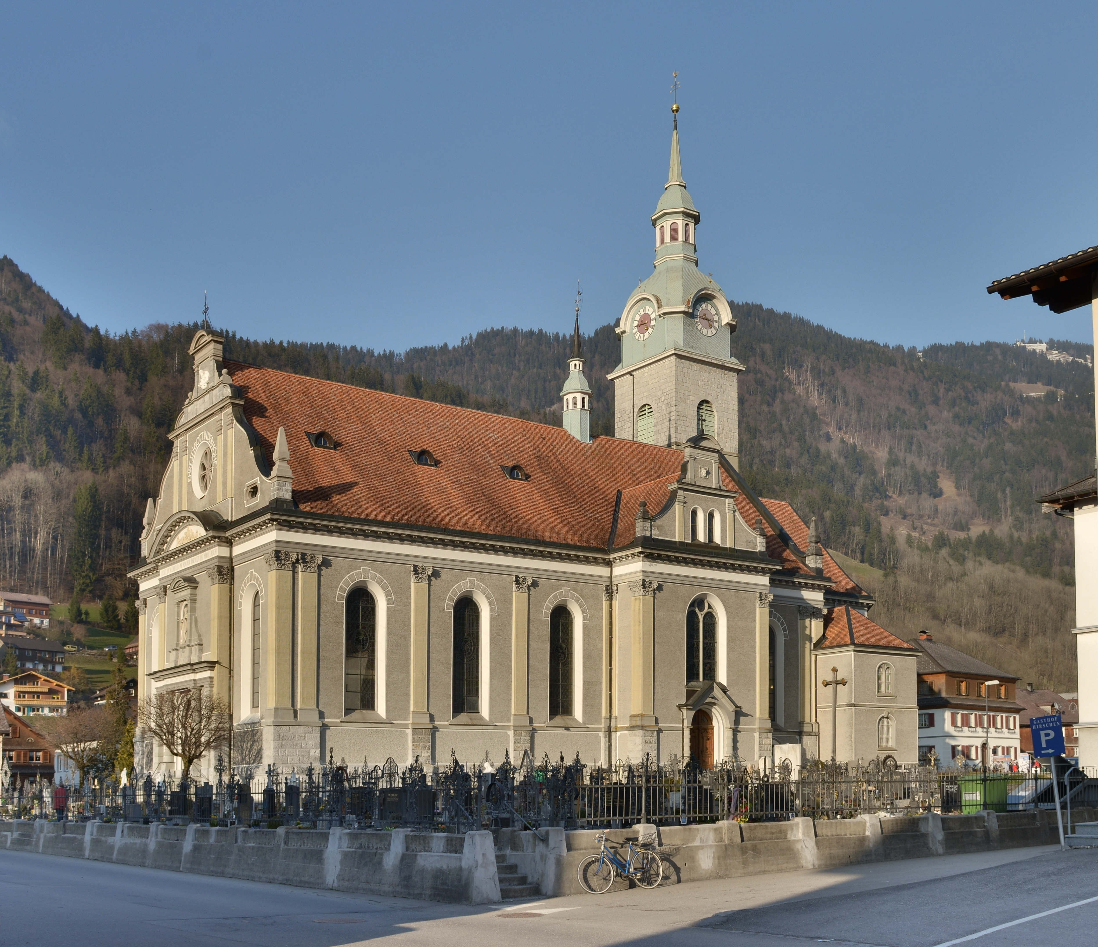 Pfarrkirche St.Jodok 1907/08 in Bezau